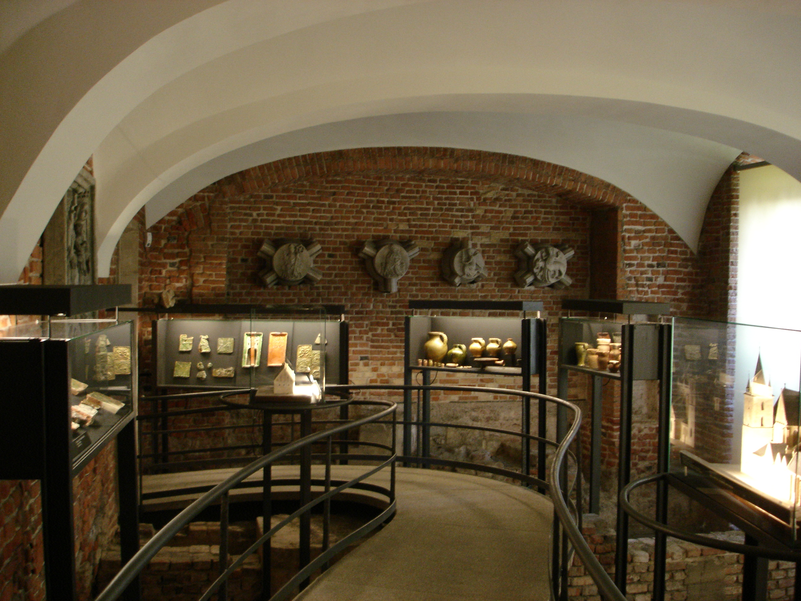 Besuchertour "Versunkener Wawel"